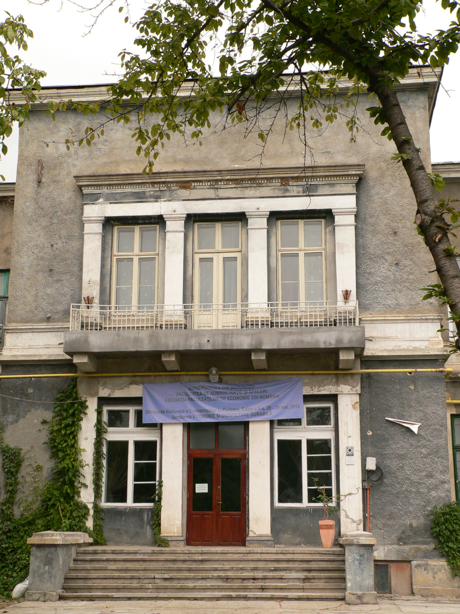 Azilul Elena Doamna, plan apropiat